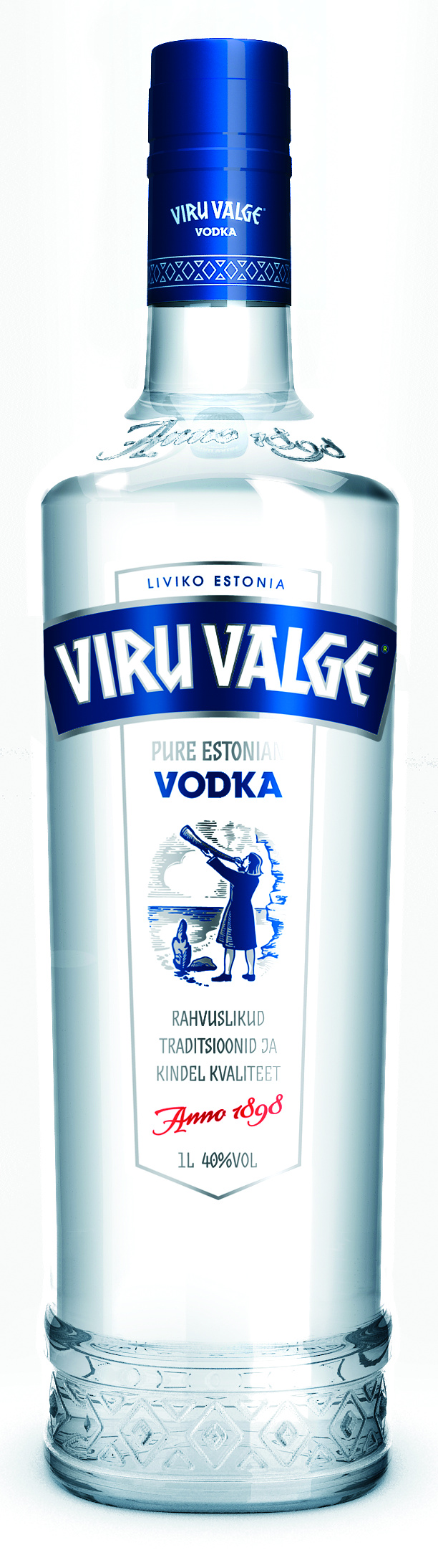 Viru Valge 1L.Tähelepanu! Tegemist on alkoholiga. Alkohol võib kahjustada teie tervist.